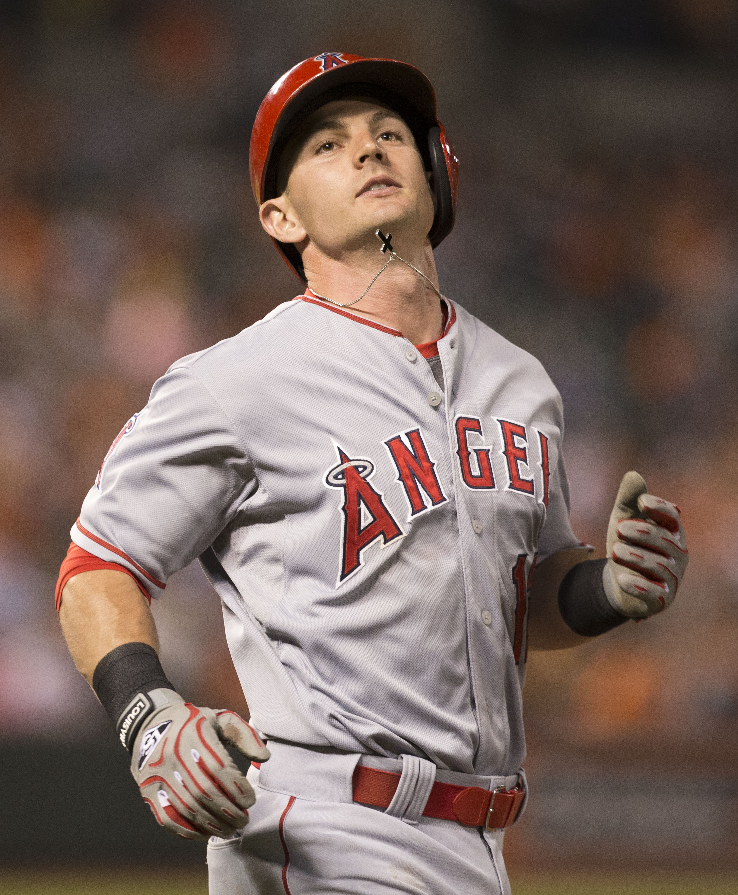 Johnny Giavotella